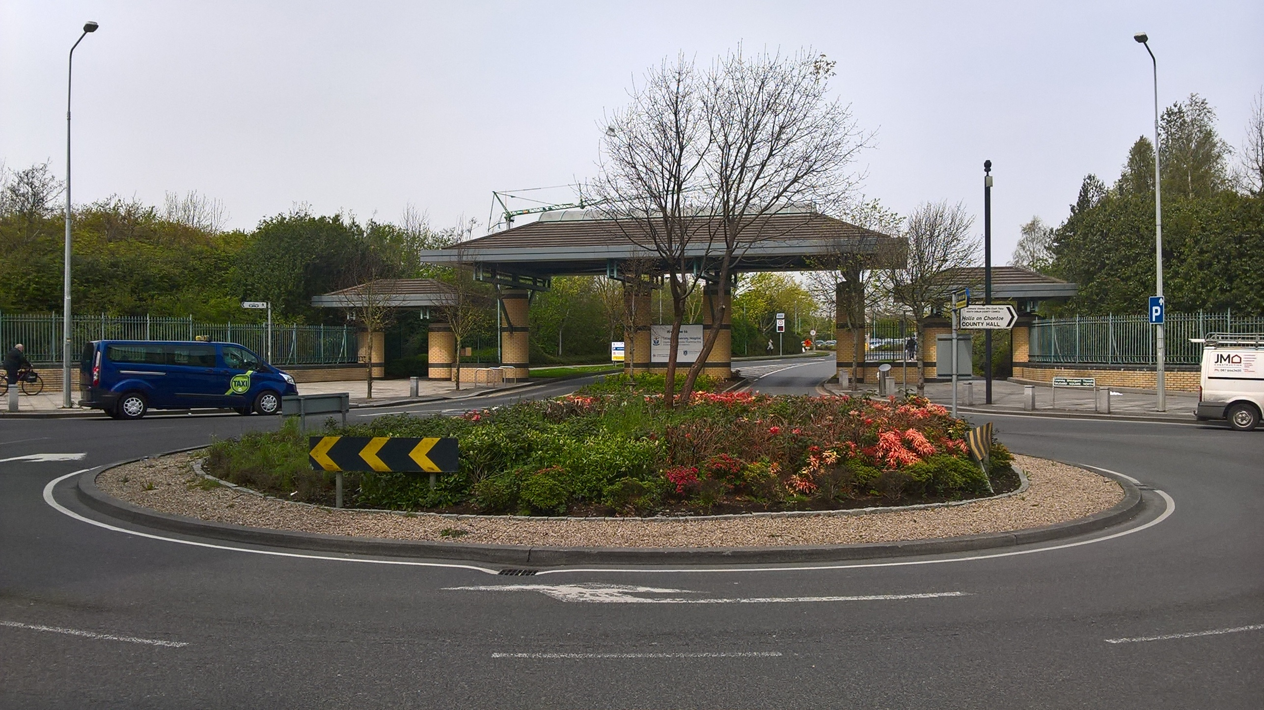 Príomh bhealach isteach go hOspidéal Thamhlachta.